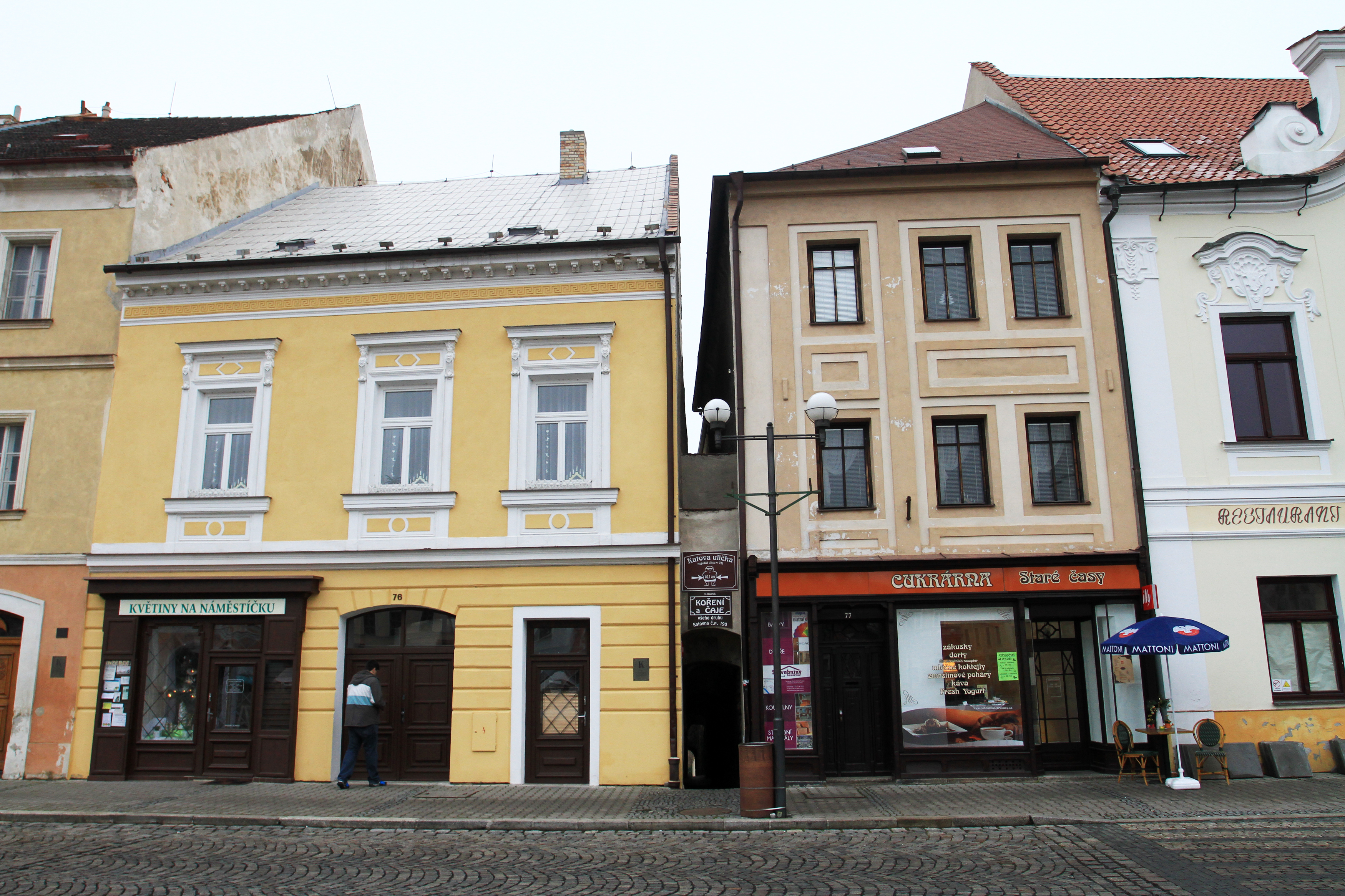 Katova ulička, Mírové náměstí mezi čp. 76 a 77 - k opevnění čp. 190, Kadaň.